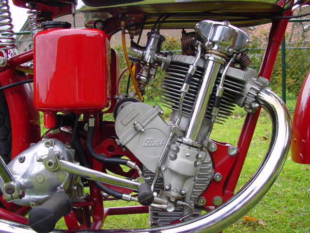 Toestemming van Yesterdays Antique Motorcycles (